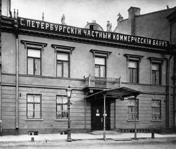 Здание Санкт-Петербургского частного коммерческого банка, Английская наб., 18